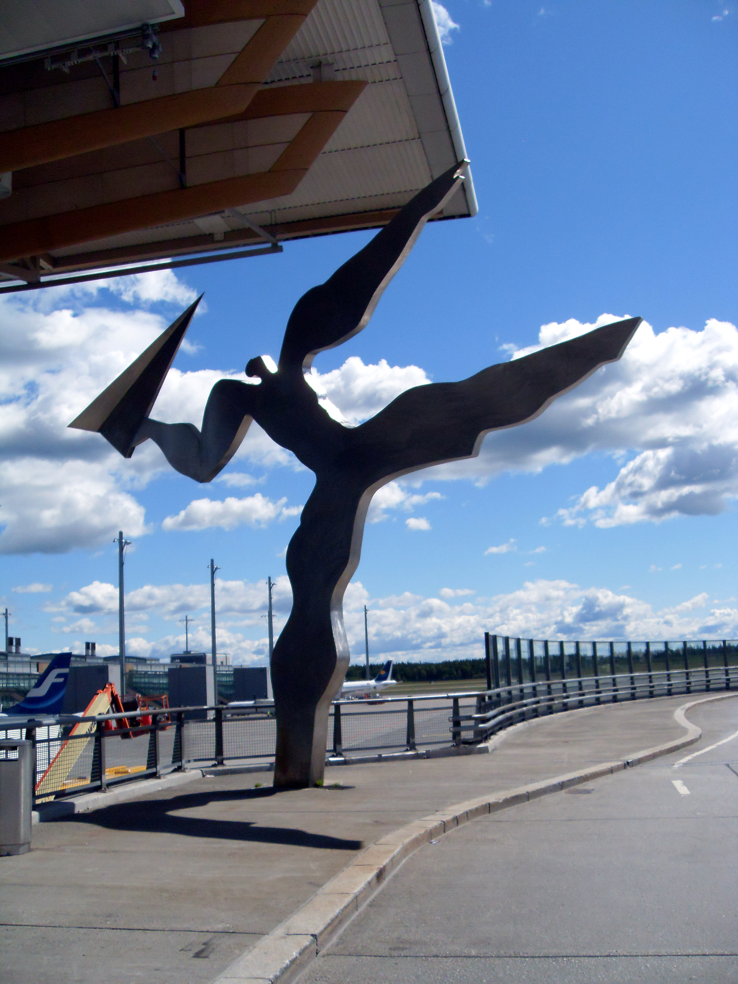 Posąg na lotnisku Oslo-Gardermoen.